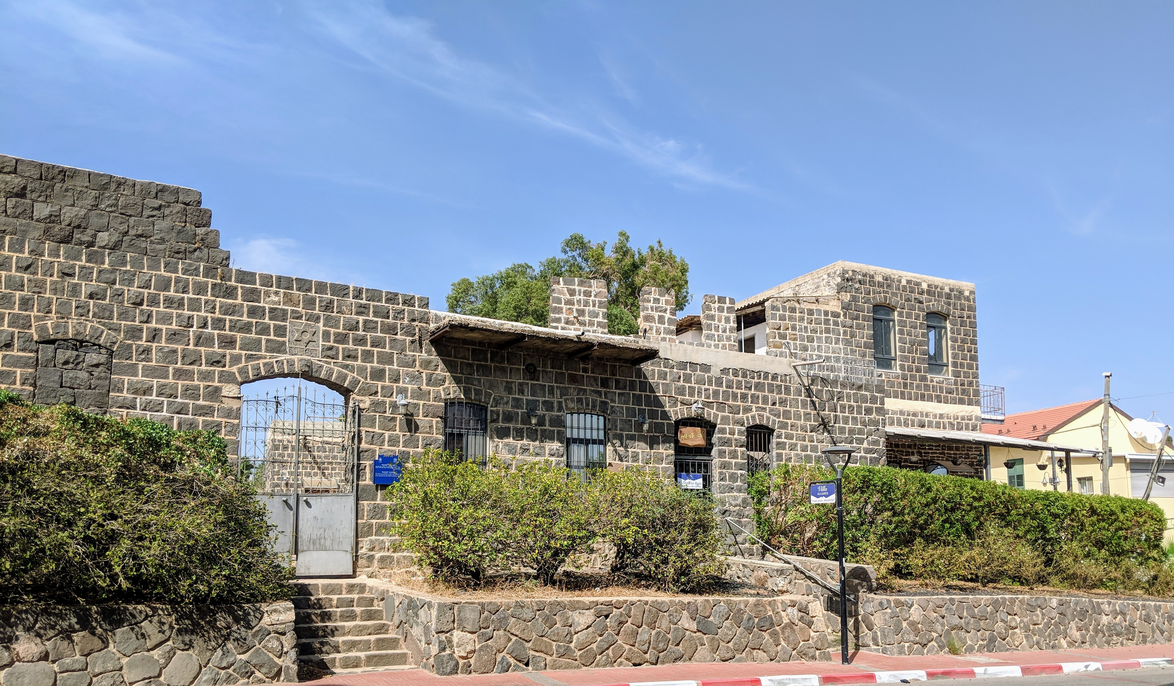 חמת טבריה הוא אתר ארכאולוגי וגן לאומי על שפת הכנרת, ליד טבריה, הידוע בעיקר בשרידי בית הכנסת שנתגלו בו.